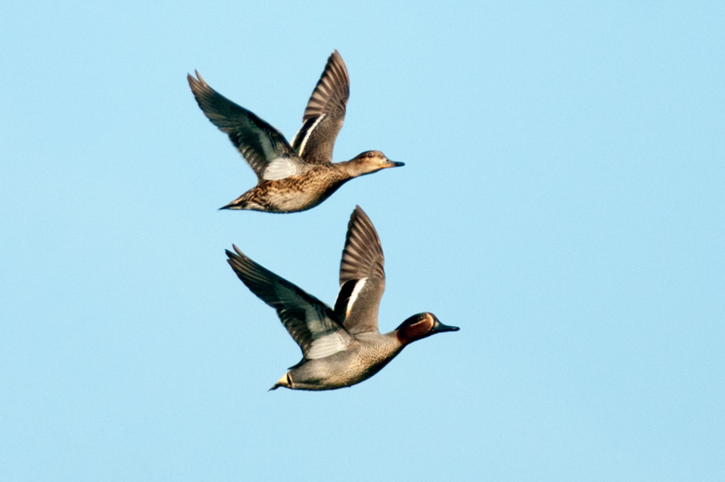 wintertaling-4.jpg